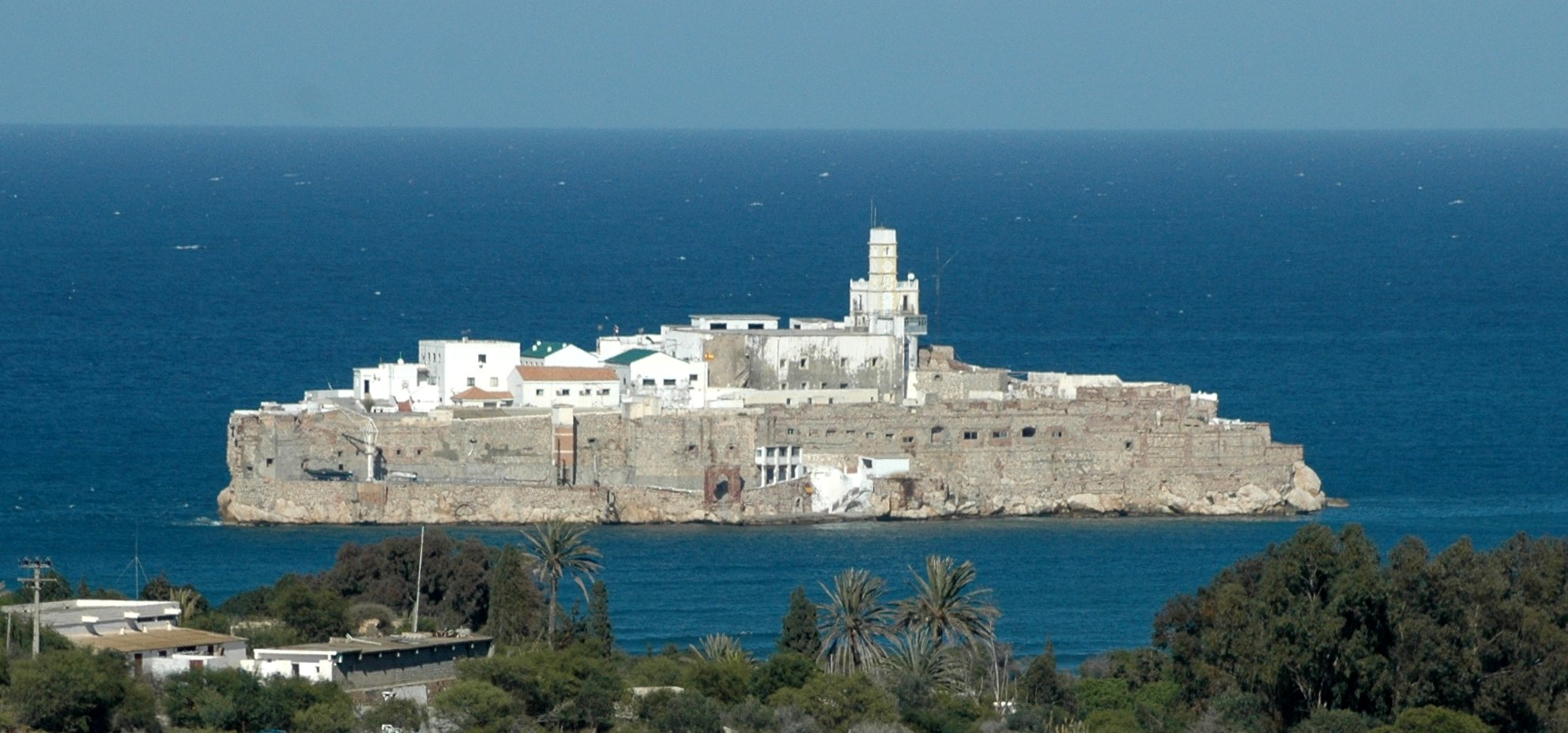 Peñón de Alhucemas desde la costa marroquí